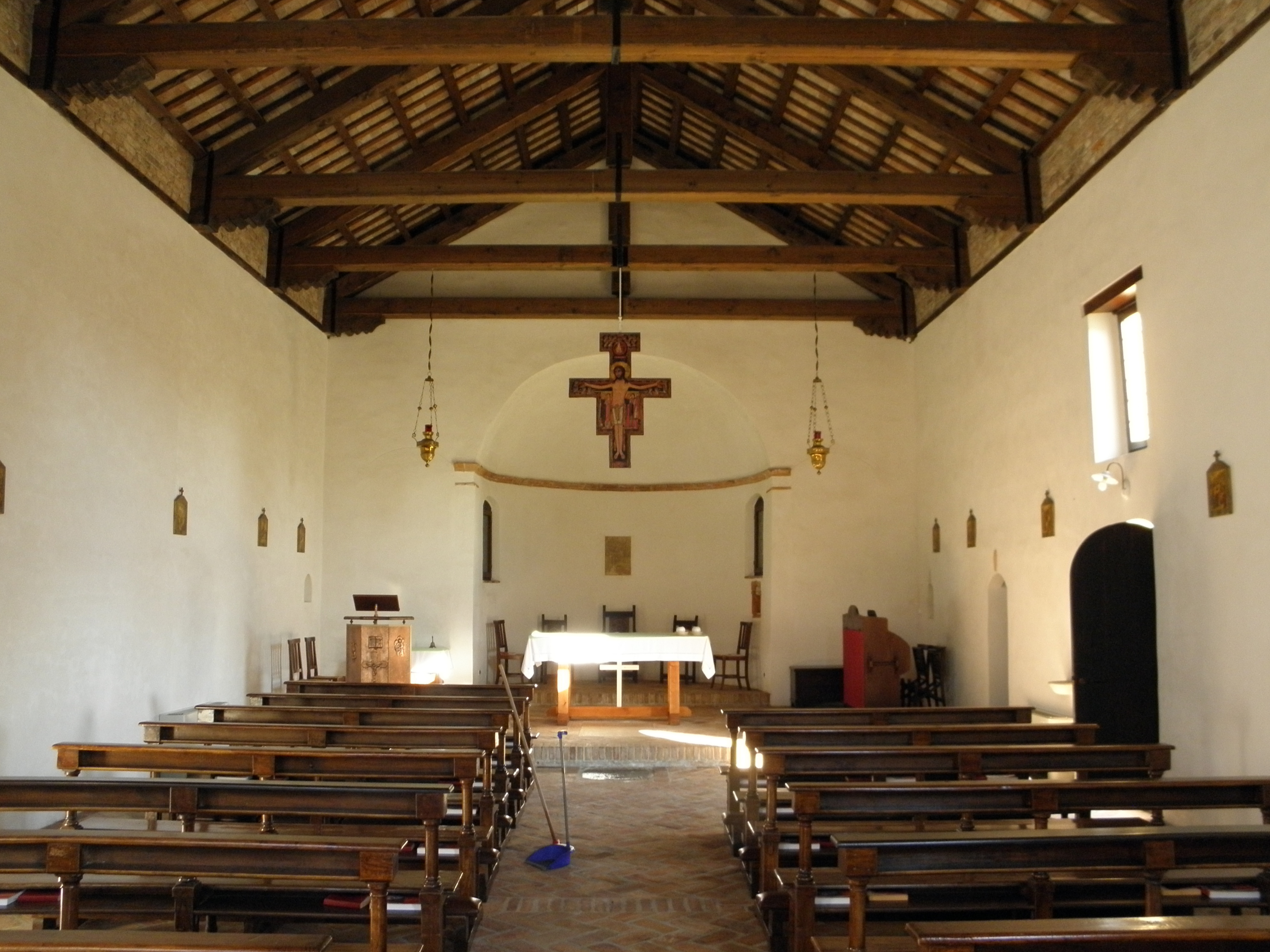 Bagnoletto, località di Bagnoli di Sopra: interno dell'oratorio di San Daniele, già parrocchiale, risalente al XIII secolo.